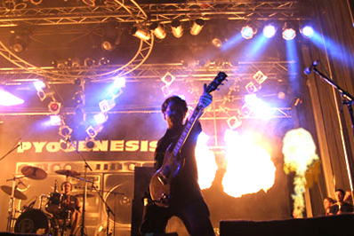 Pyogenesis auf dem Sommer Breeze 2003